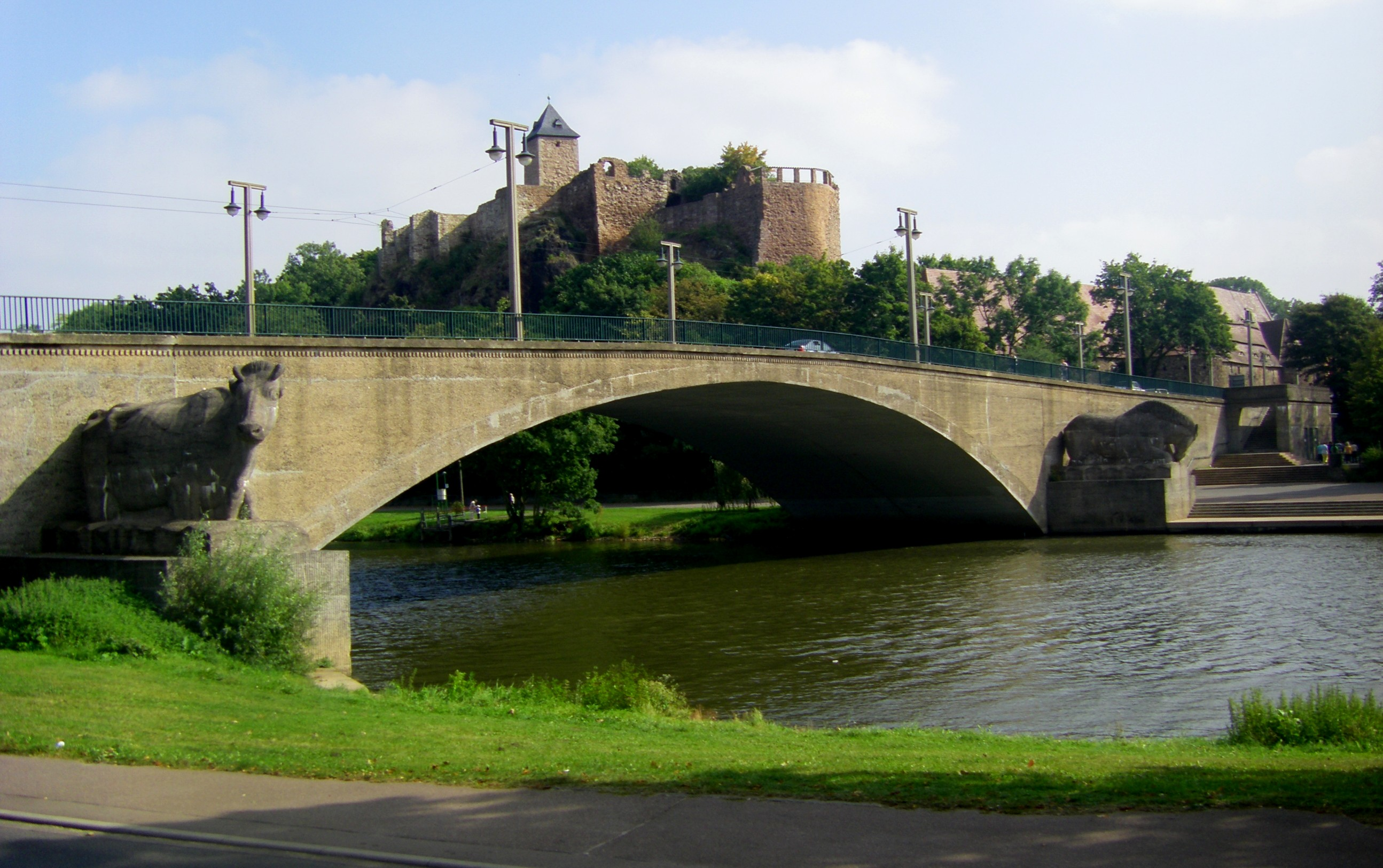 Giebichensteinbrücke in Halle mit den Pfeilerfiguren von Gerhard Marcks